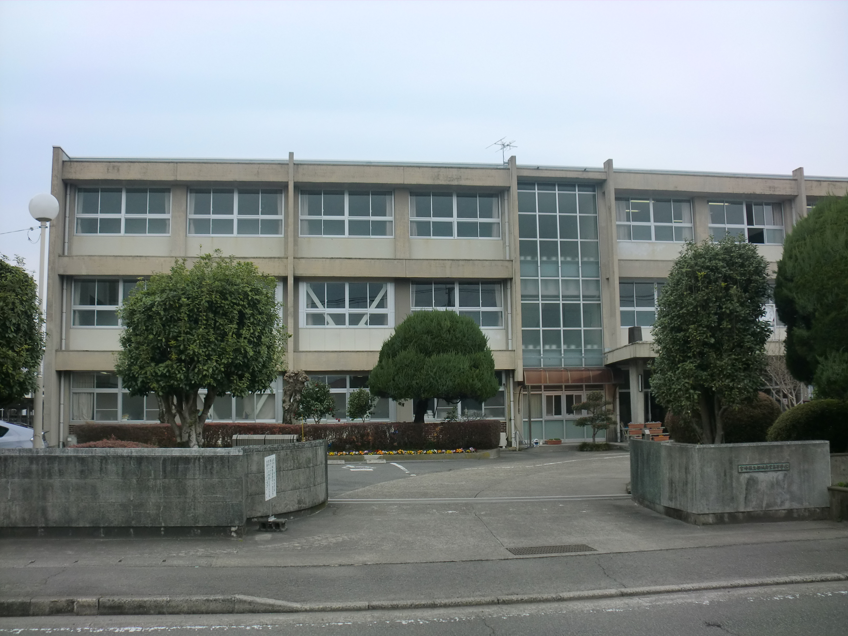 都城市にある宮崎県立都城商業高等学校